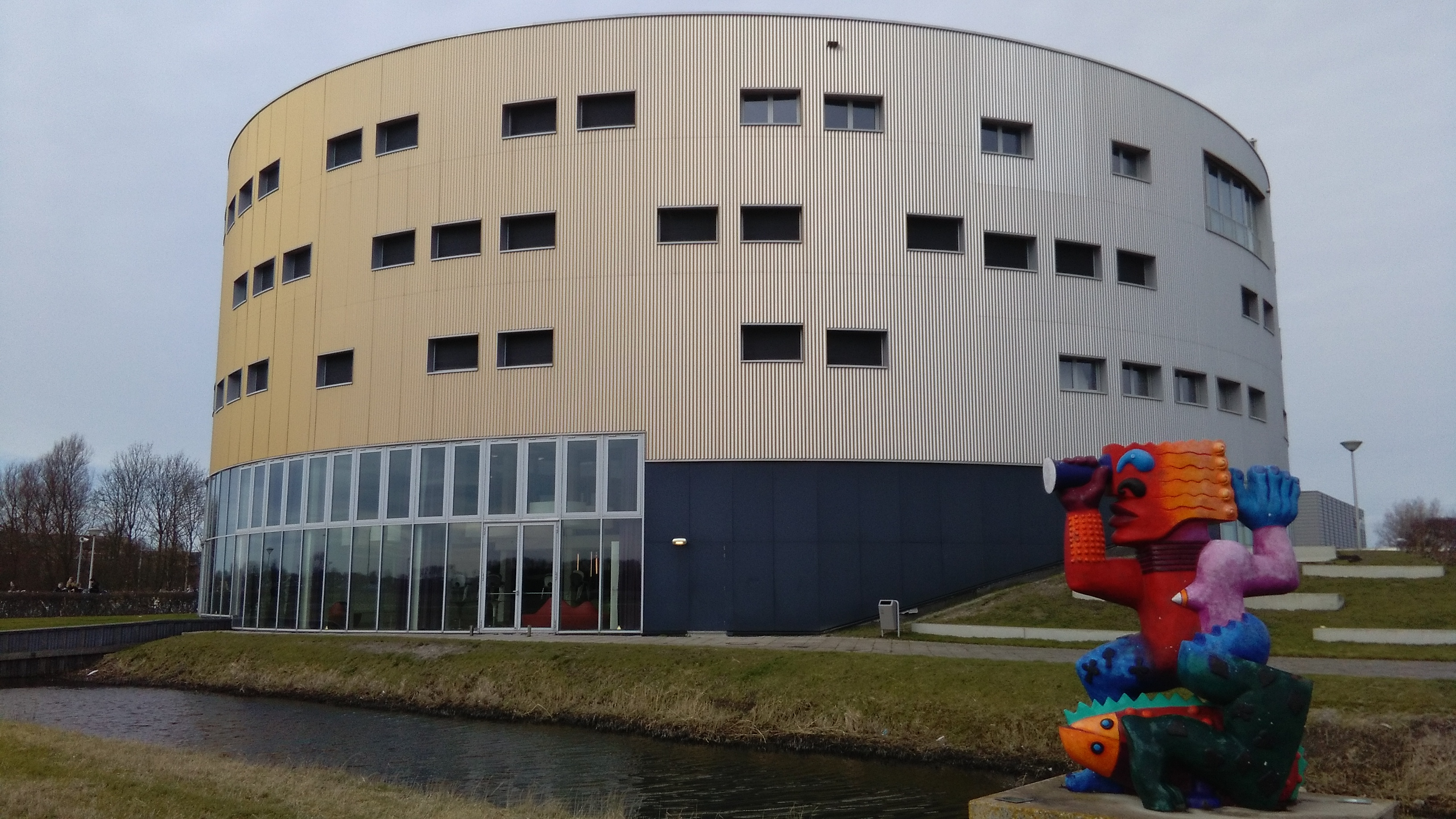 Het Junior College in Julianadorp is een van de vestigingen van de Scholen aan Zee.